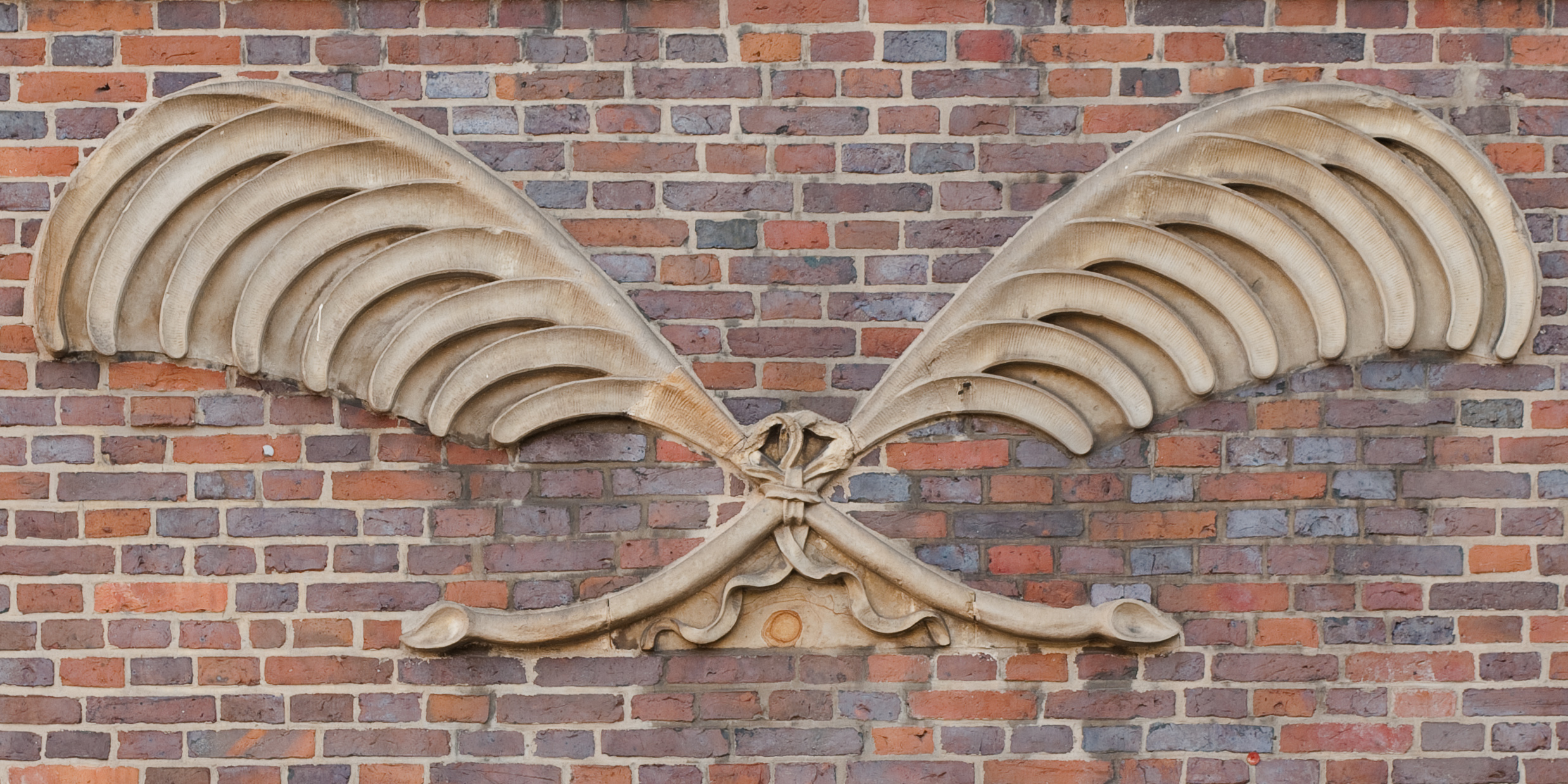 Eine von 5 "Palmwedel"-Verziehrungen, die ursprünglich die Fassade eines Hauses in der Düsternstraße 43–51 schmückten und nach dessen Abbruch 1906 an das MHG gingen.